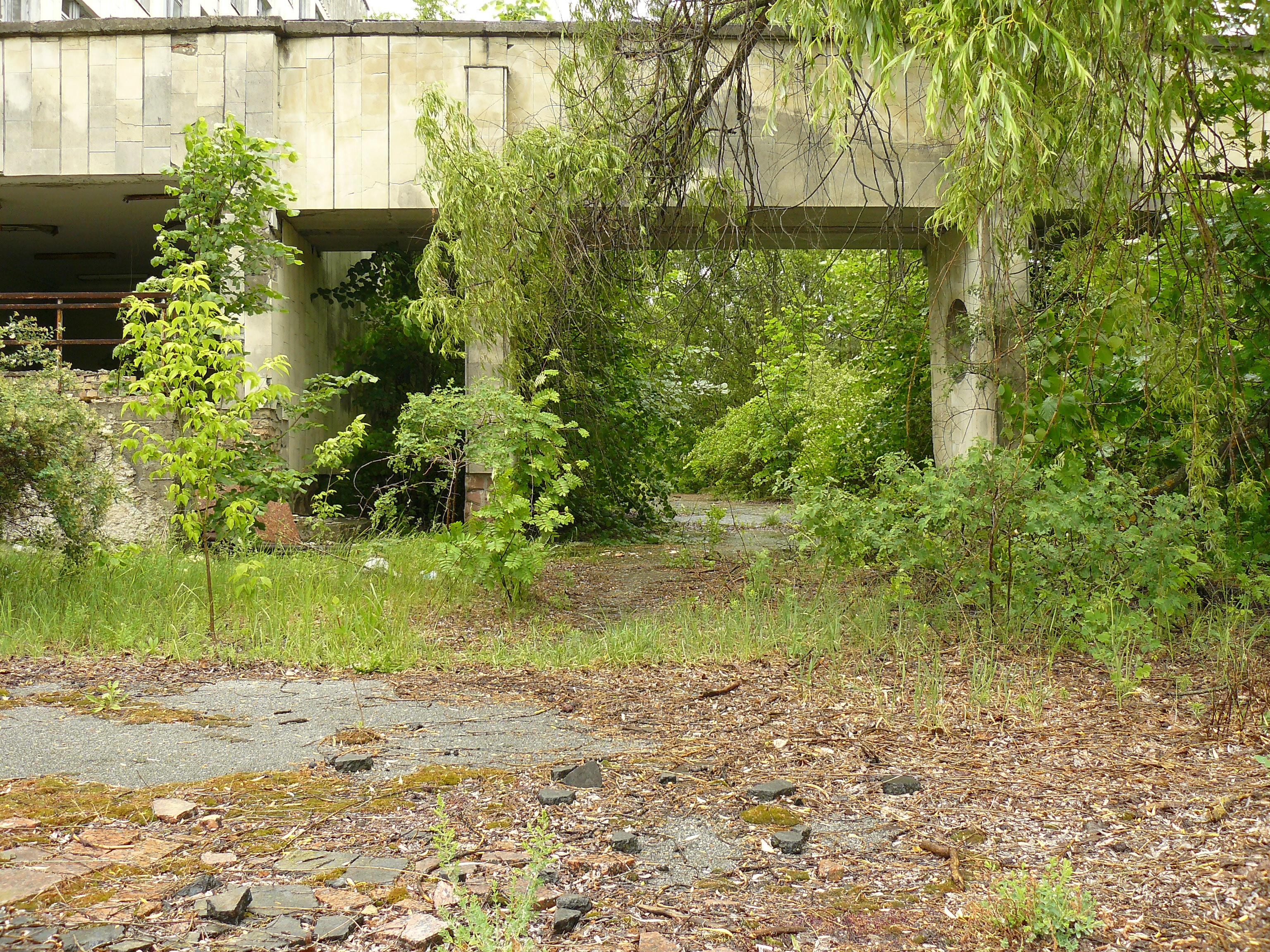 Вікіекспедиція до Чорнобильської зони. Прип'ять